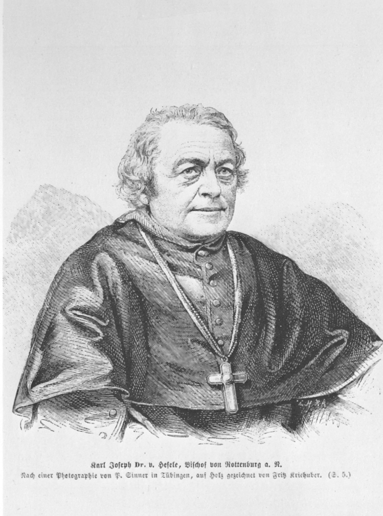 Karl Joseph von Hefele Holzstich von Fritz Kriehuber nach einer Fotografie von Paul Sinner Über Land und Meer, Nr. 39, 1870, S. 1 214*143mm